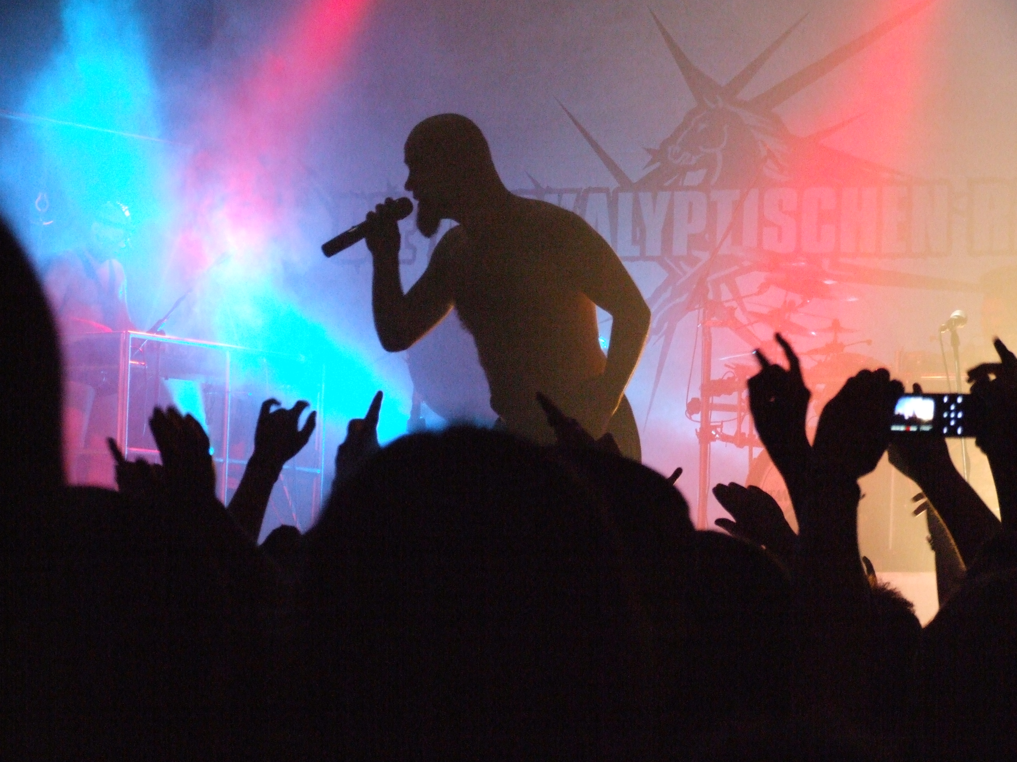 Fuchs (Daniel Täumel), Sänger der Metal-Band "Die Apokalyptischen Reiter", am 13. Juni 2009, Sommerfesthalle, Otterstadt, Deutschland, links im Hintergrund in Nebel und Licht mit Keyboard und Kettenschaukel, Dr. Pest (Mark Szakul)